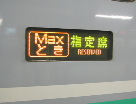 E1系Maxとき・LEDサボ（新潟駅12番線）